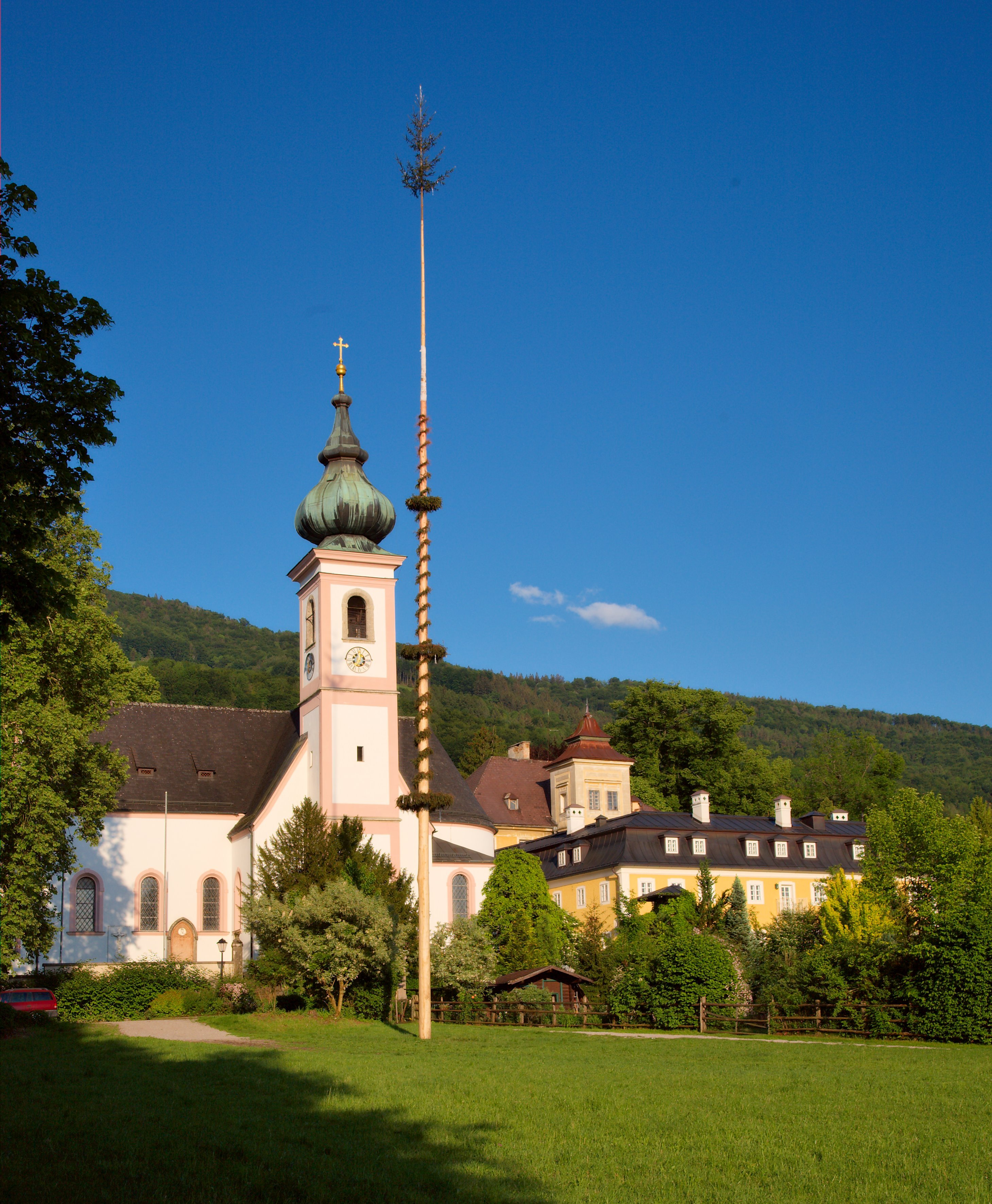 Schloss Aigen in Salzburg, Kath. Pfarrkirche Aigen, hl. Johannes der Täufer mit ehem. Friedhof